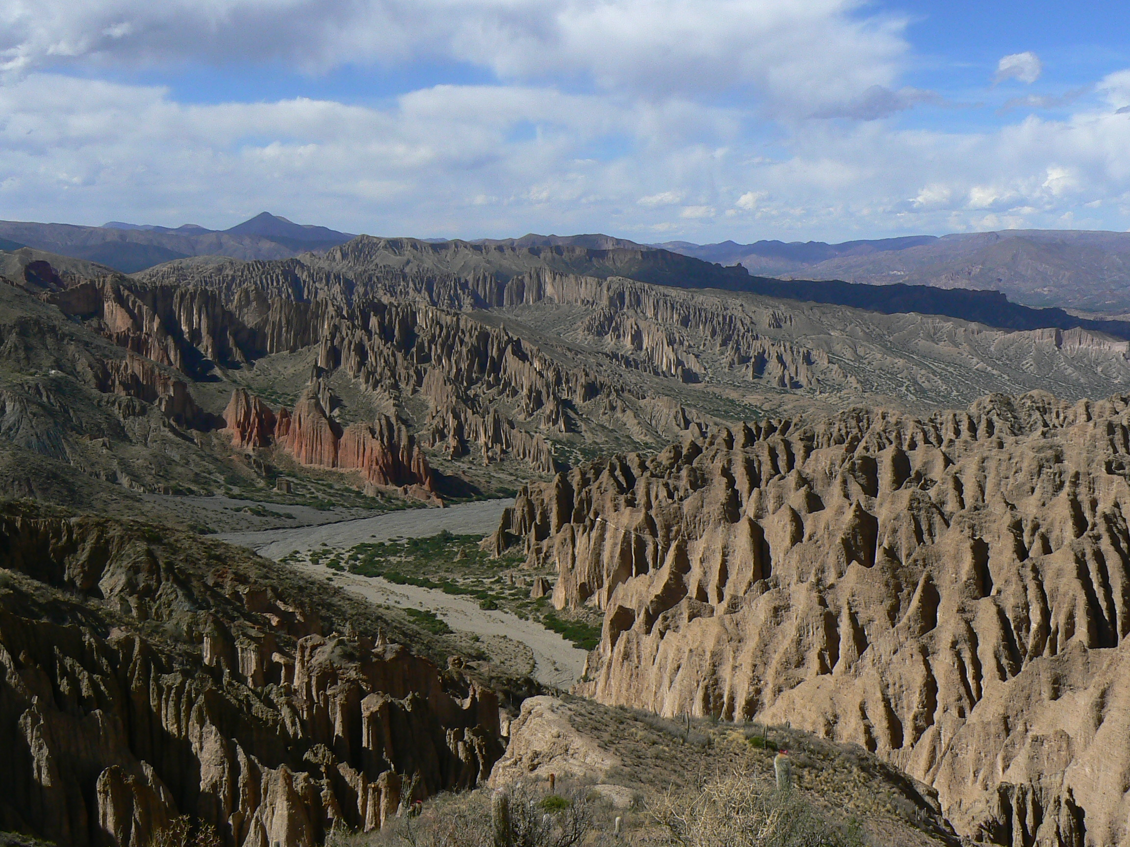 El Sillar o Valle de la Luna, Potosí, Bolivia. Runa Simi: Killa Qhichwa (El Sillar). Killa Qhichwa, P'utuqsi suyu, Buliwya.